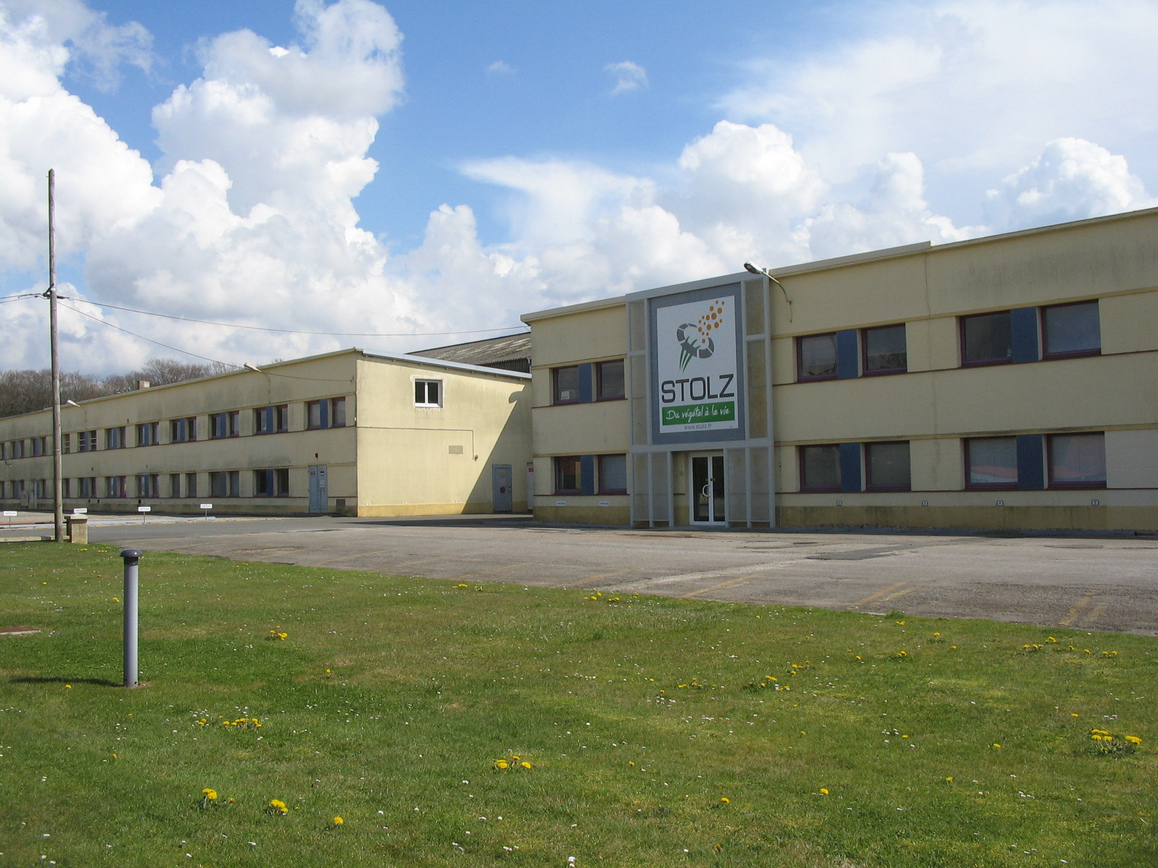 L'usine Stolz.